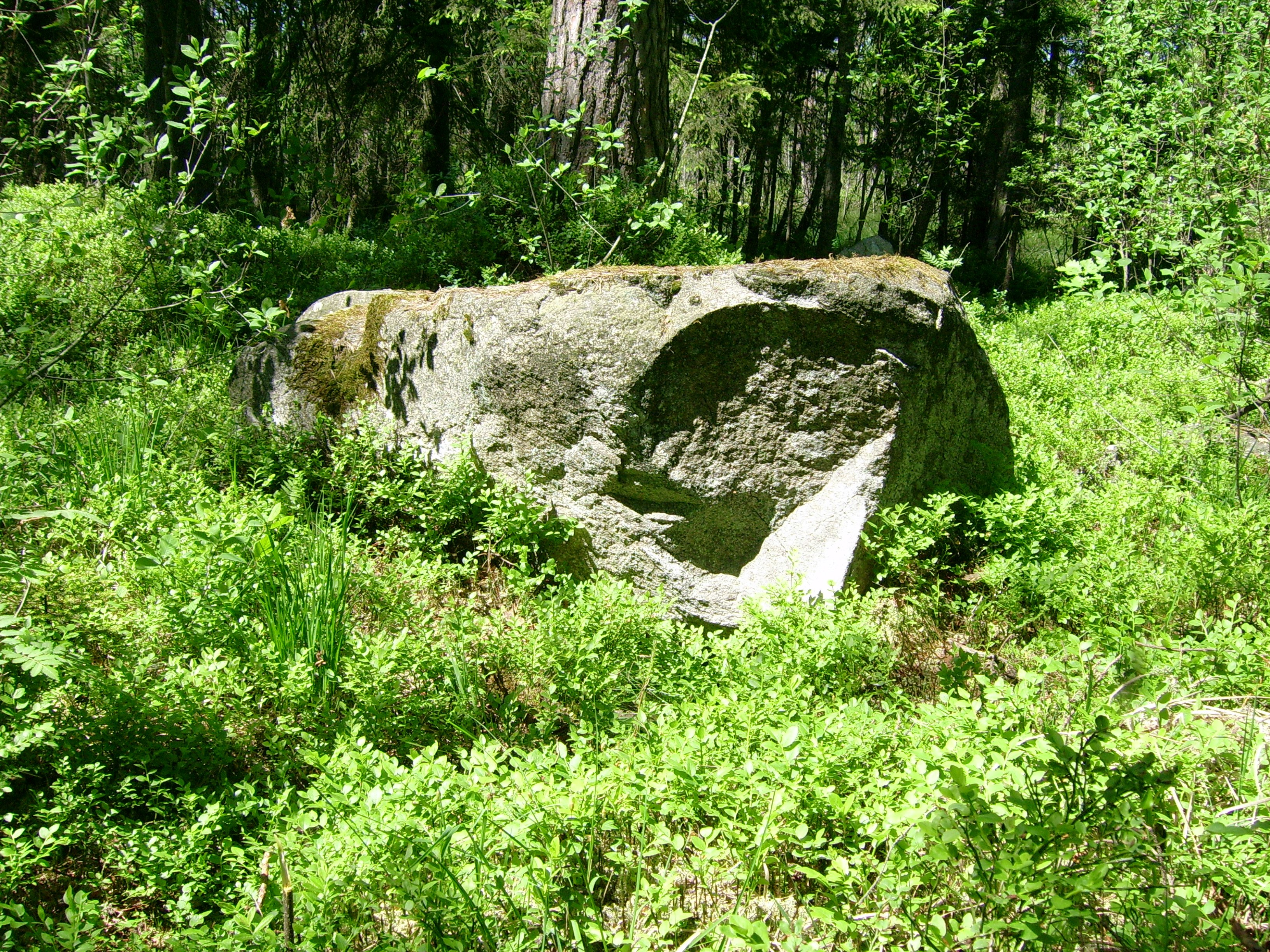 Velnio stalas – mitologinių akmenų grupė Mažonų seniūnijoje